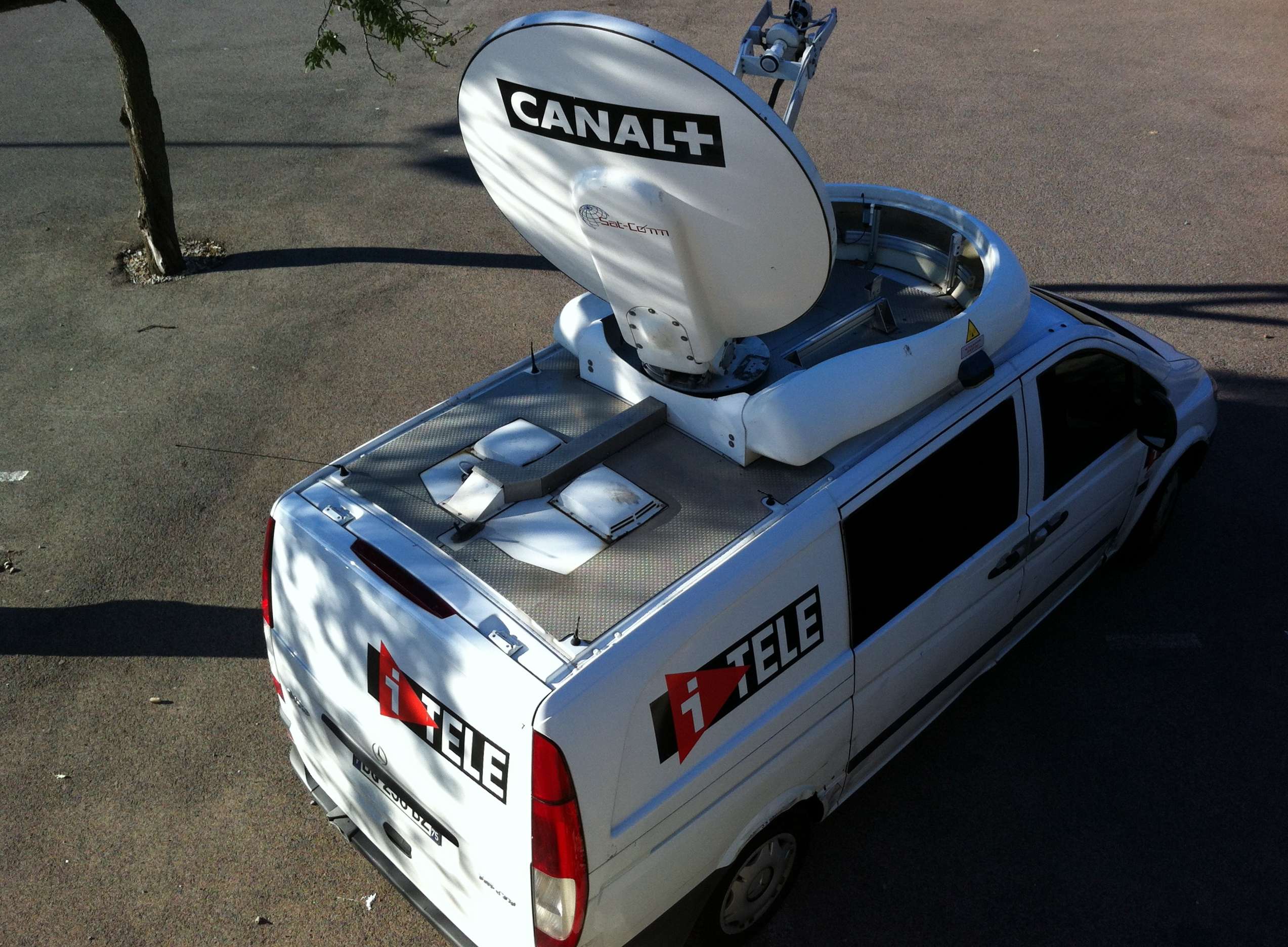 Un Mercedes Vito, véhicule satellite (« V.S. ») - régie satellite - de I Télé le 11 aout 2013.